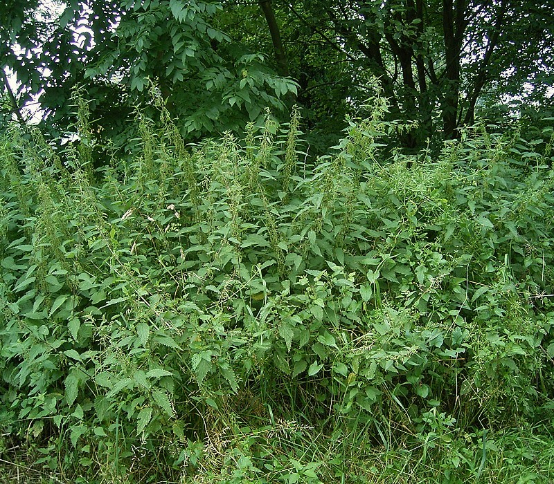 Urtica dioica